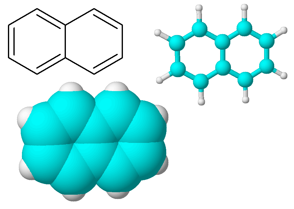 Naftaleen, weergegeven in 2D, 3D ball-and-stick en 3D spacefilled. Lichtblauw = koolstof, wit = waterstof